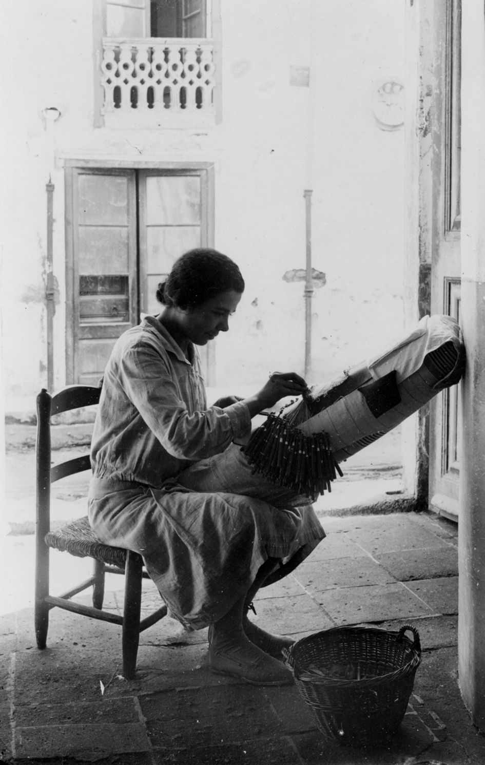 Puntaire realitzant les puntes de la Capella de Sant Jordi Arenys de Munt, 1927 Fotografia Joaquim Castells